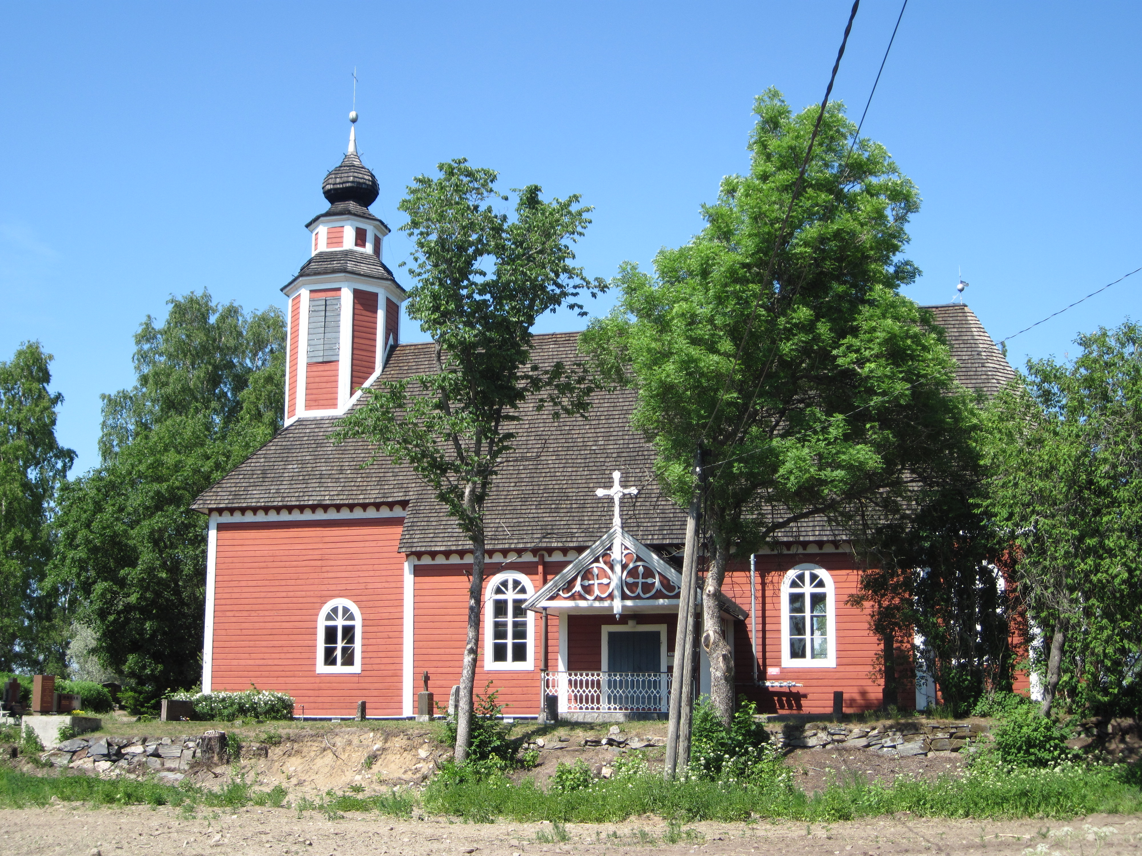 Metsämaan kirkko kesällä 2011